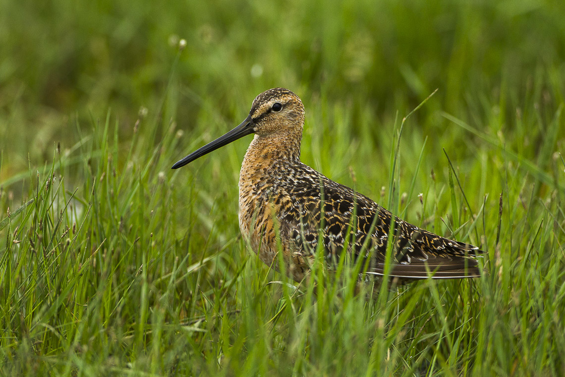 Long-billed Dowitcher - Malheur NWR - Oregon_S4E9199